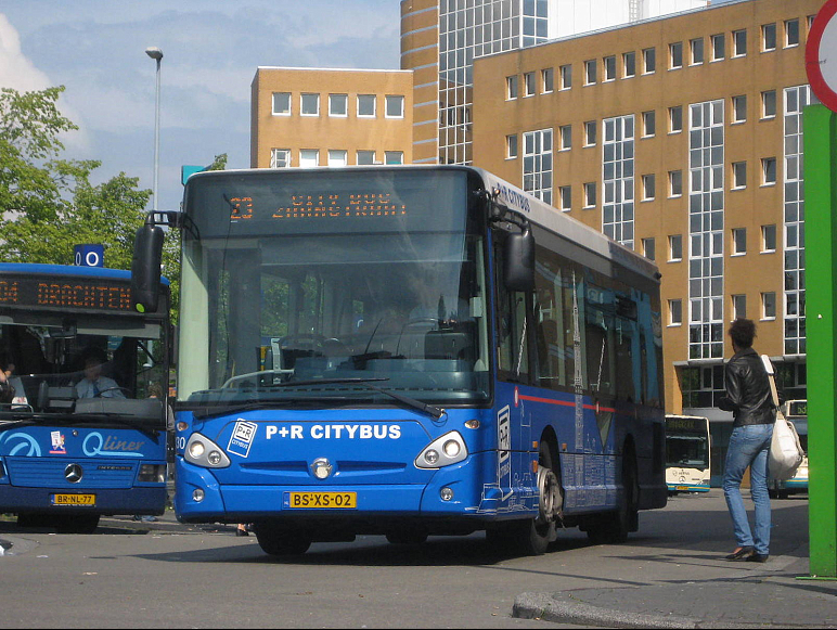 Arriva bus 6030 van het type Irisbus EuroRider Access Bus GX127/Iveco in de huisstijl van Citybus Groningen. Deze bus is sinds 2010 als nr 30 bij Transportes Sul do Tejo (TST) in Portugal.